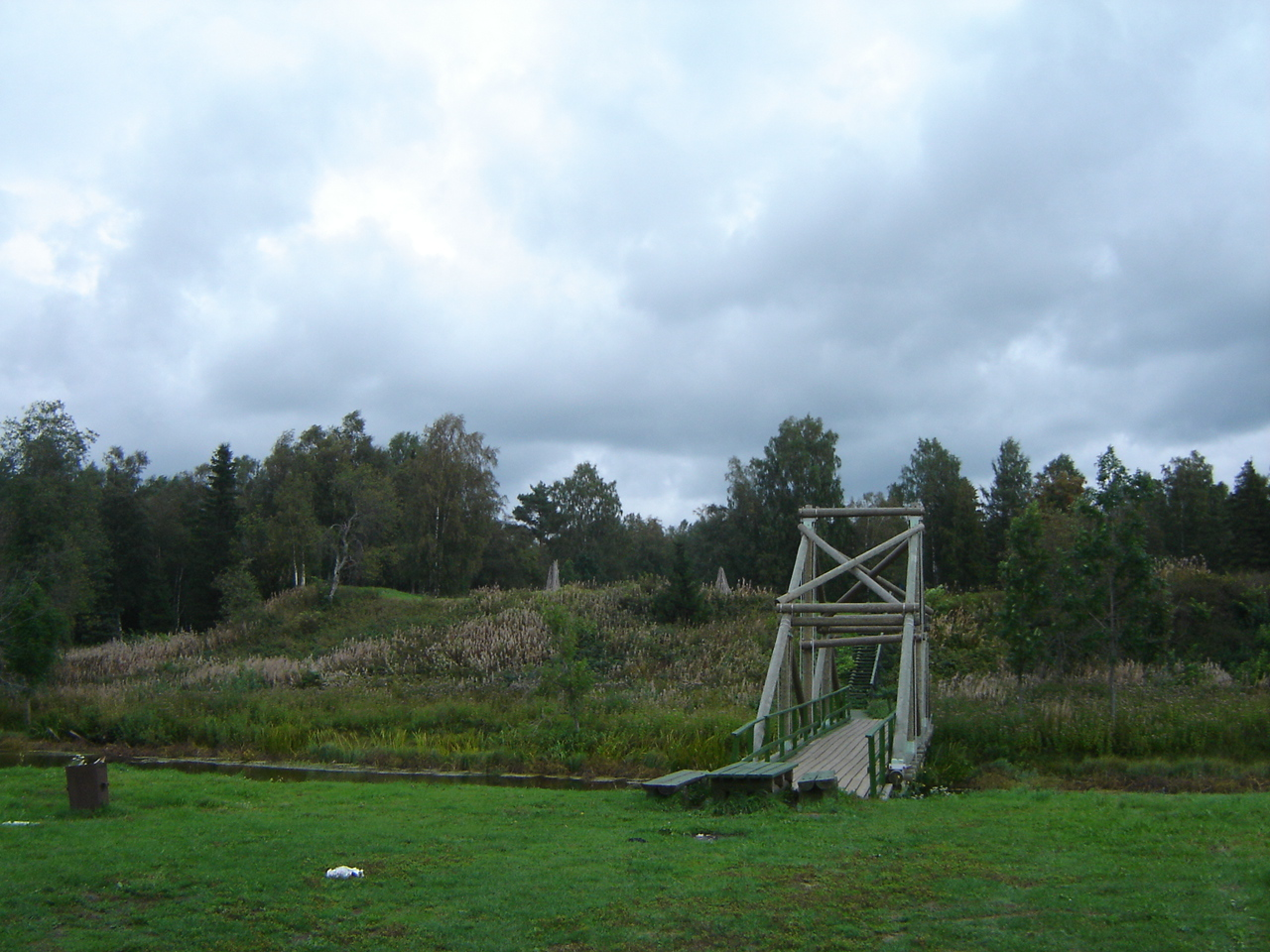 Lohu Jaanilinna vall koos uue sillaga